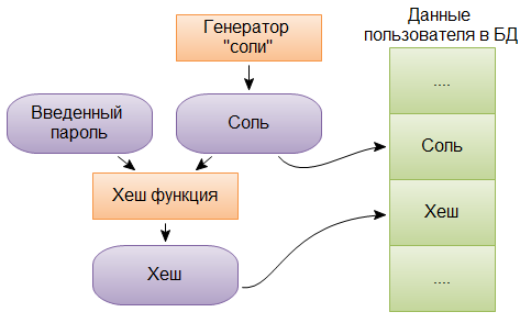 Пример использования